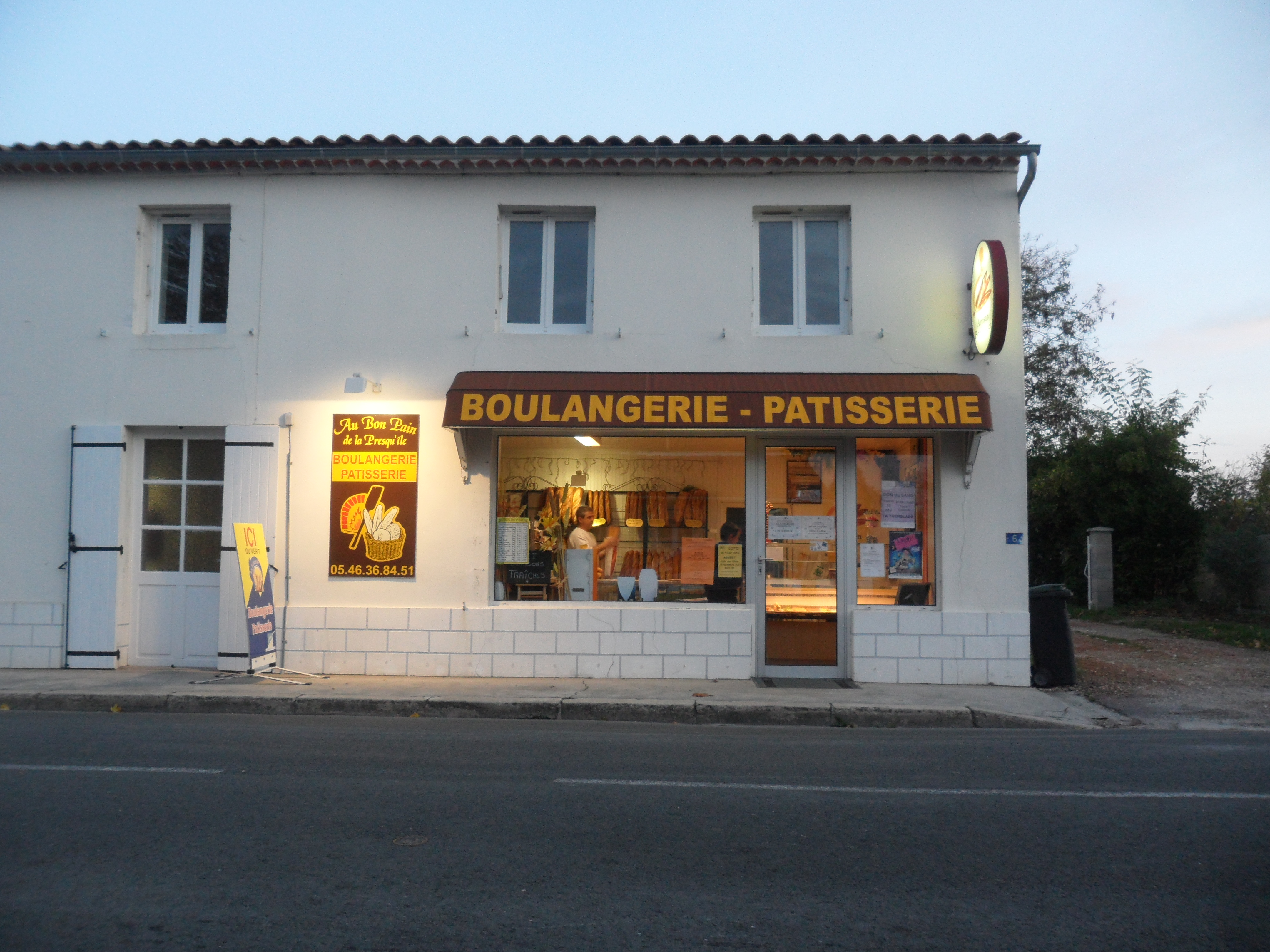 Une des boulangerie d'Arvert